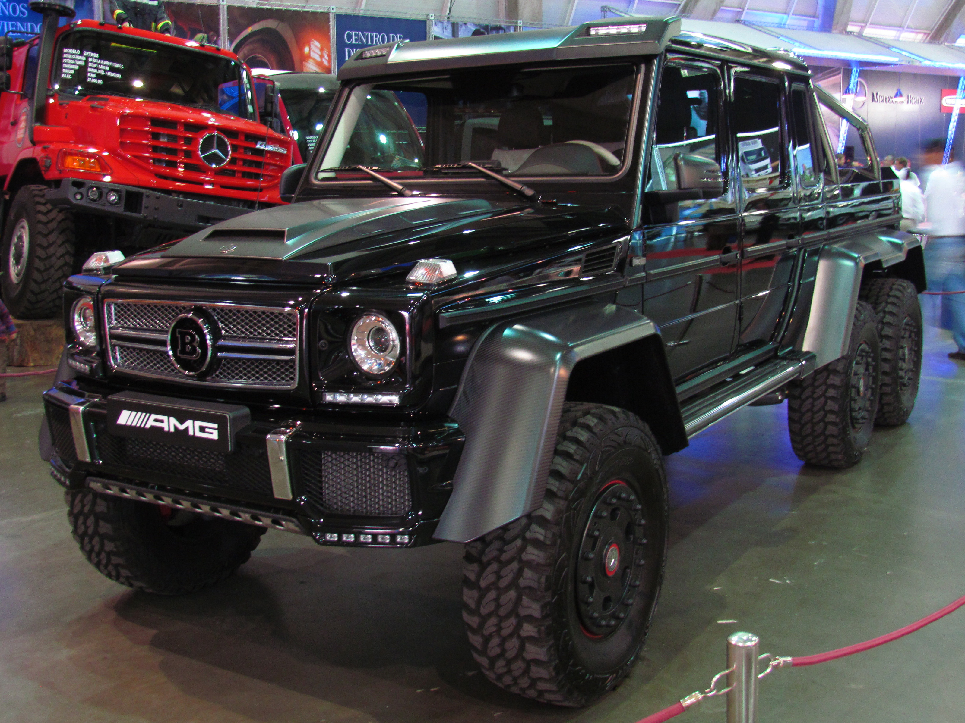 Mercedes Benz G 63 AMG Brabus B63S 700 6x6